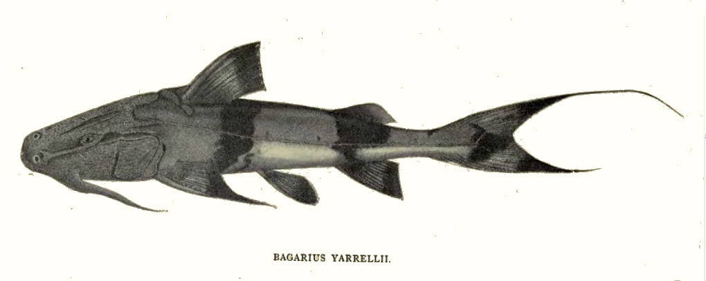 Bagarius yarrelli (Sykes, 1839)